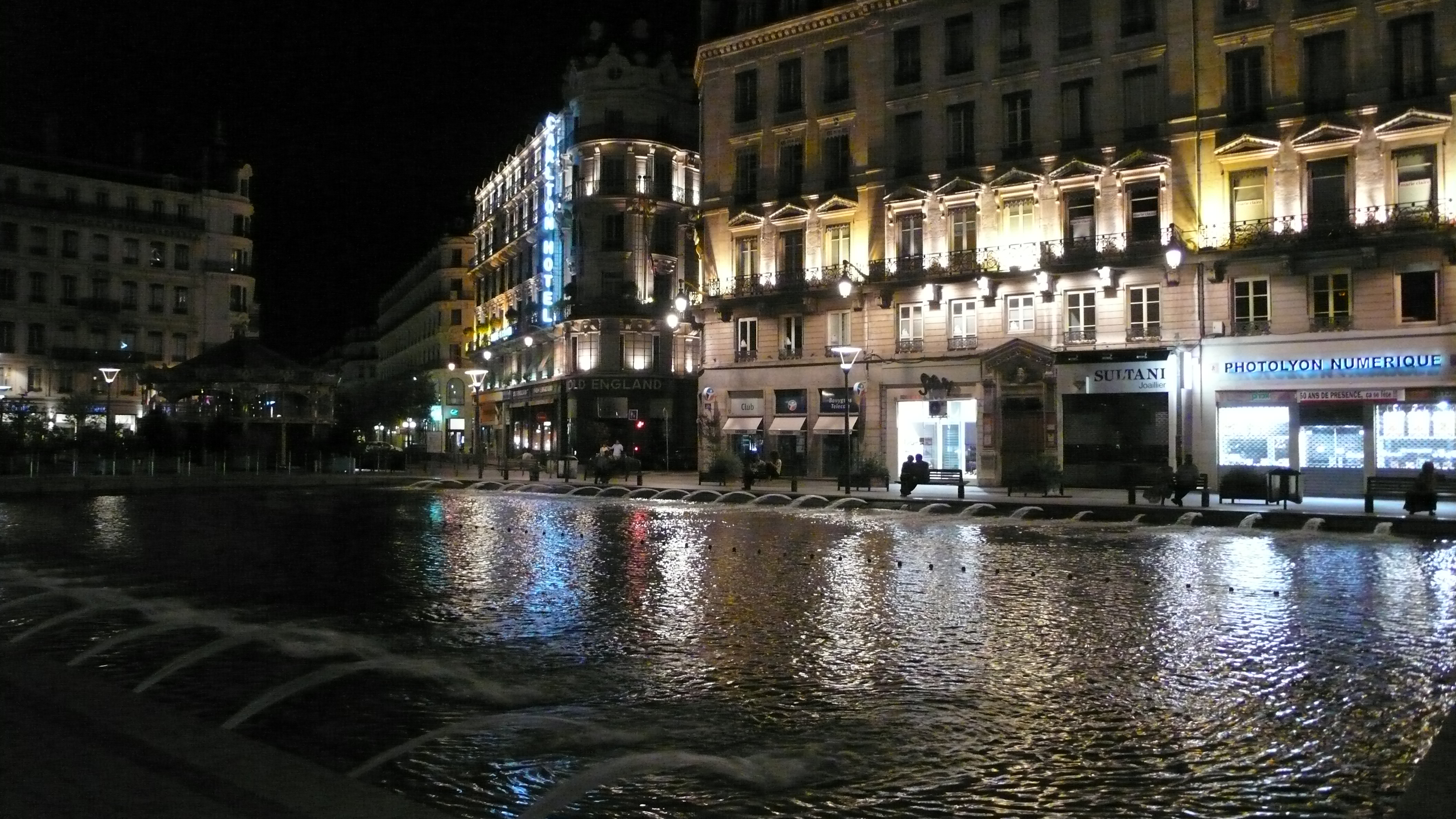 Lyon, Le Place de la République